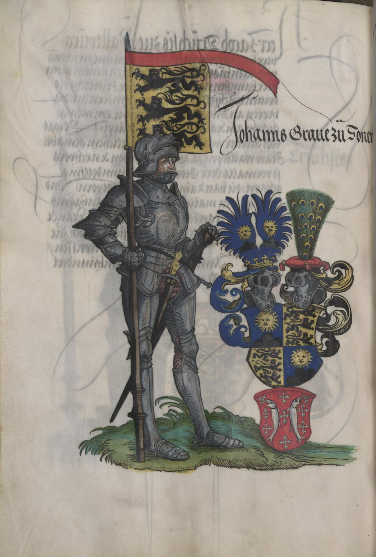 Holzschnitt aus der Chronik der Truchsessen von Waldburg (Truchsessenchronik) in der Pergamenthandschrift der Württembergischen Landesbibliothek Stuttgart (ehemals Fürstl. Bibliothek Donaueschingen), Cod. Don. 590 Johannes Graue zu Sonen[perg]